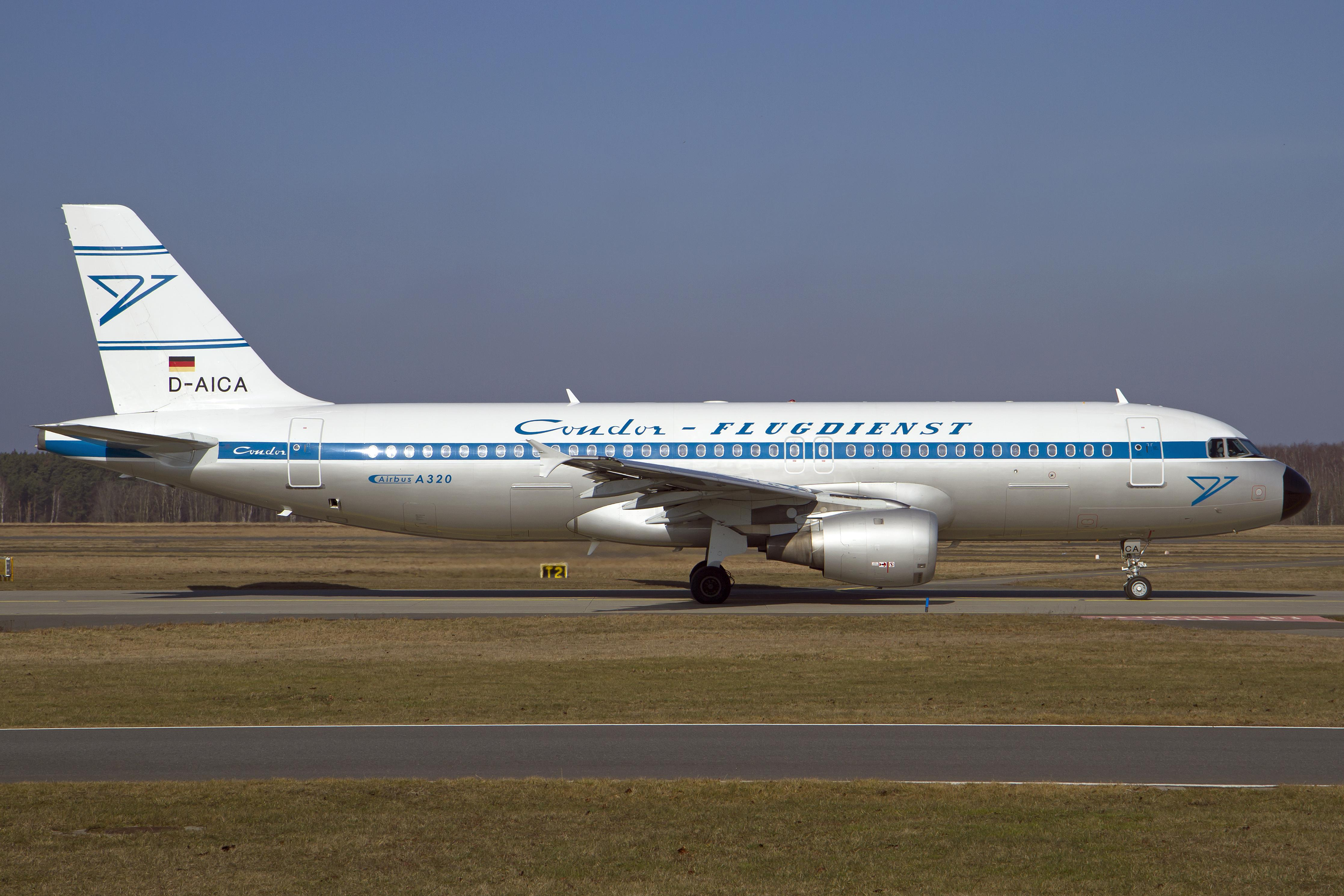 HAJ/EDDV 02-03-13